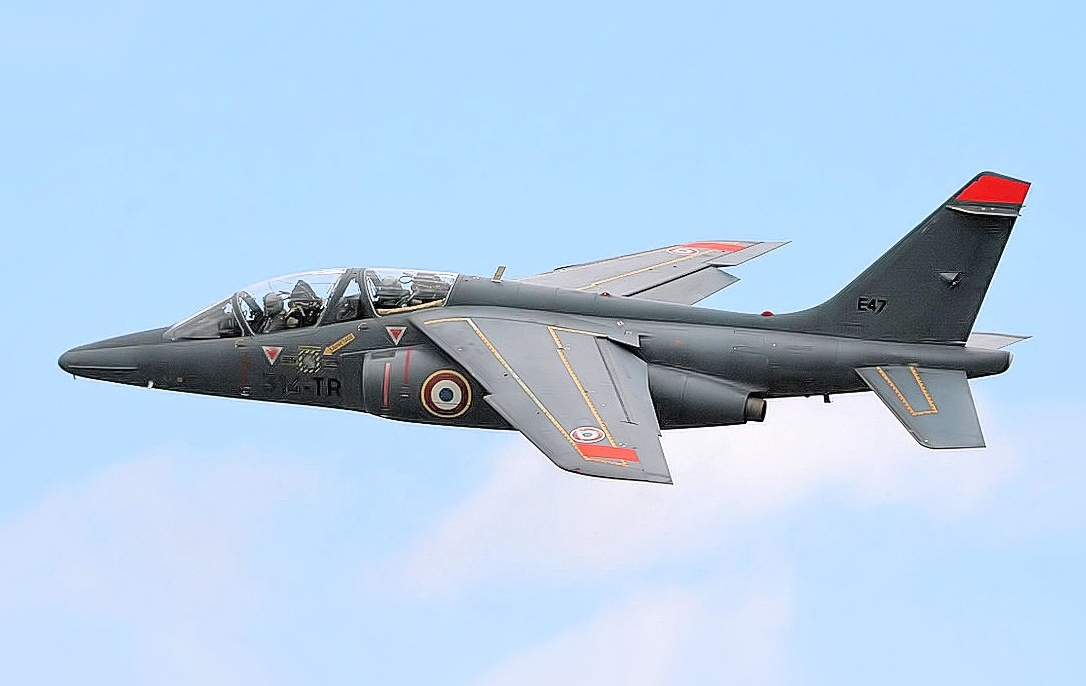 Alpha Jet - RIAT 2007